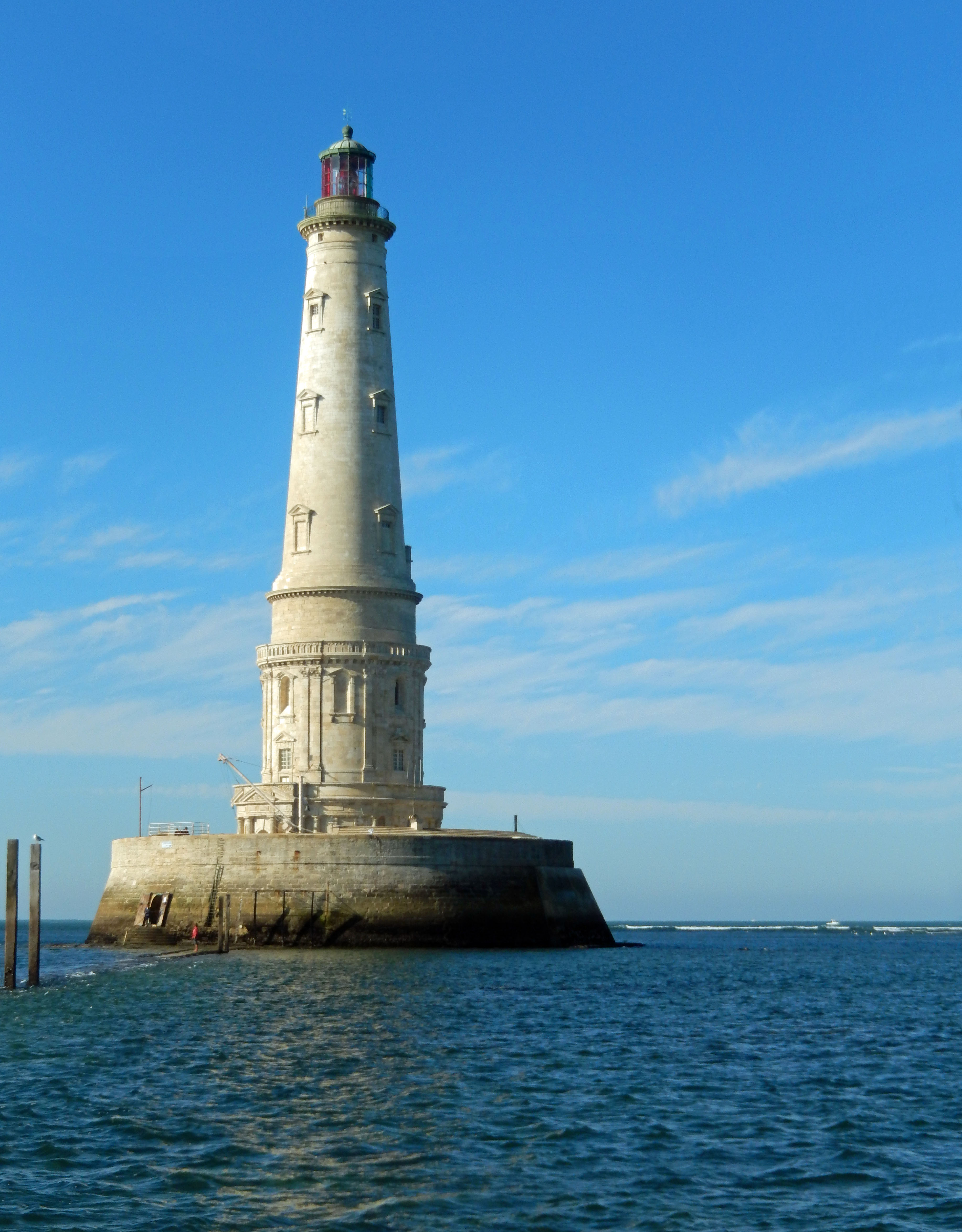 2014-09-27 Le Verdon, Gironde, phare de Cordoua